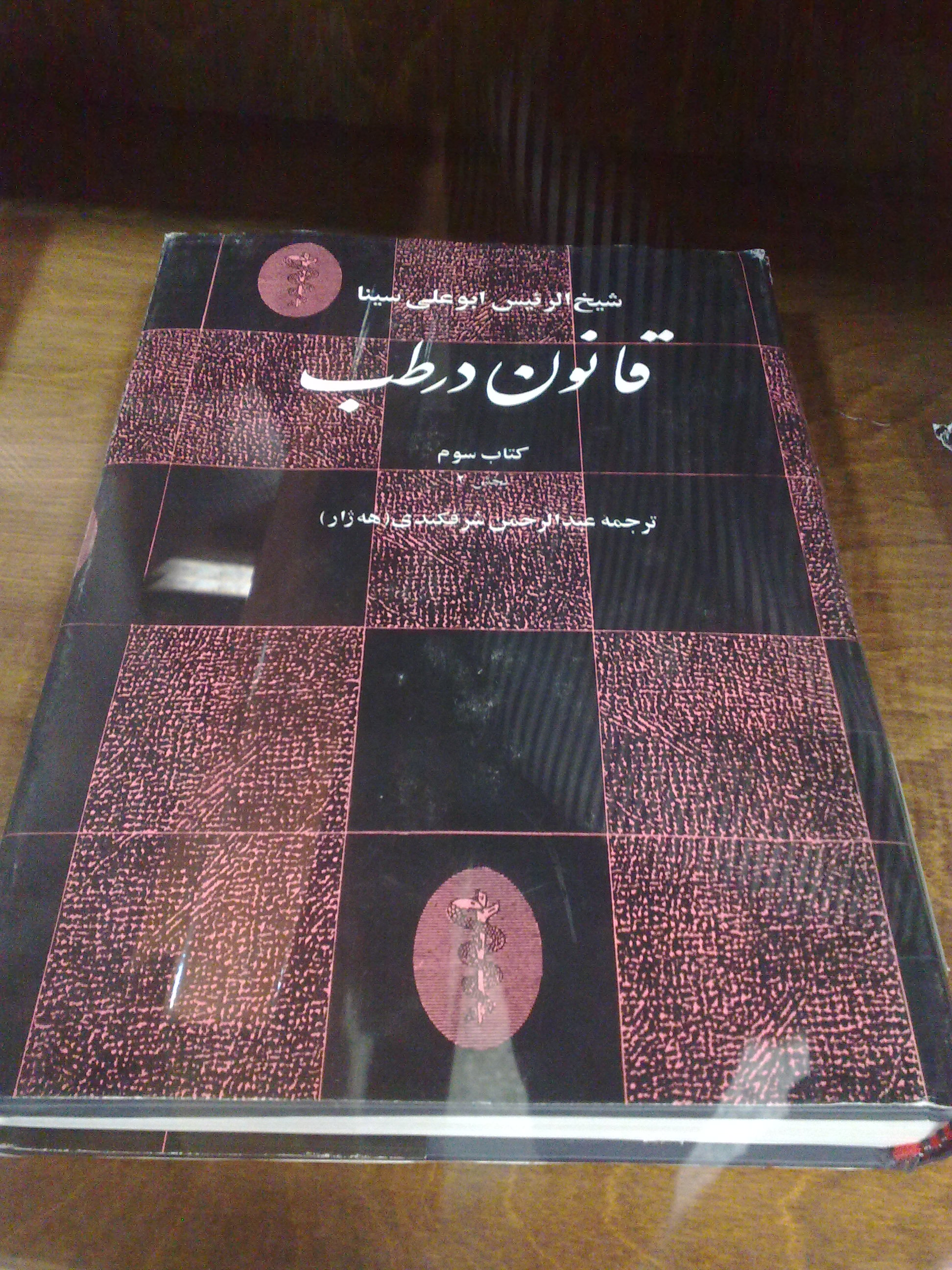 کوردیی ناوەندی: کتێبی "قانوون دەر تێب" نووسراوەی "ئیبنی سینا، وەڕگێردراوی "ھەژار"